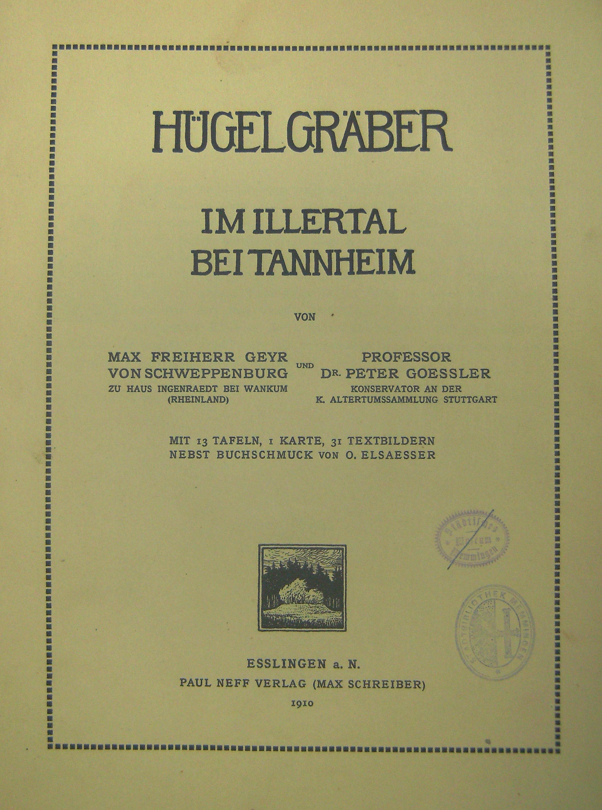 Max Geyr von Schweppenburg, Peter Goessler: Hügelgräber im Illertal bei Tannheim, Neff, Esslingen a. N. (1910). Exemplar des Stadtarchivs Memmingen.